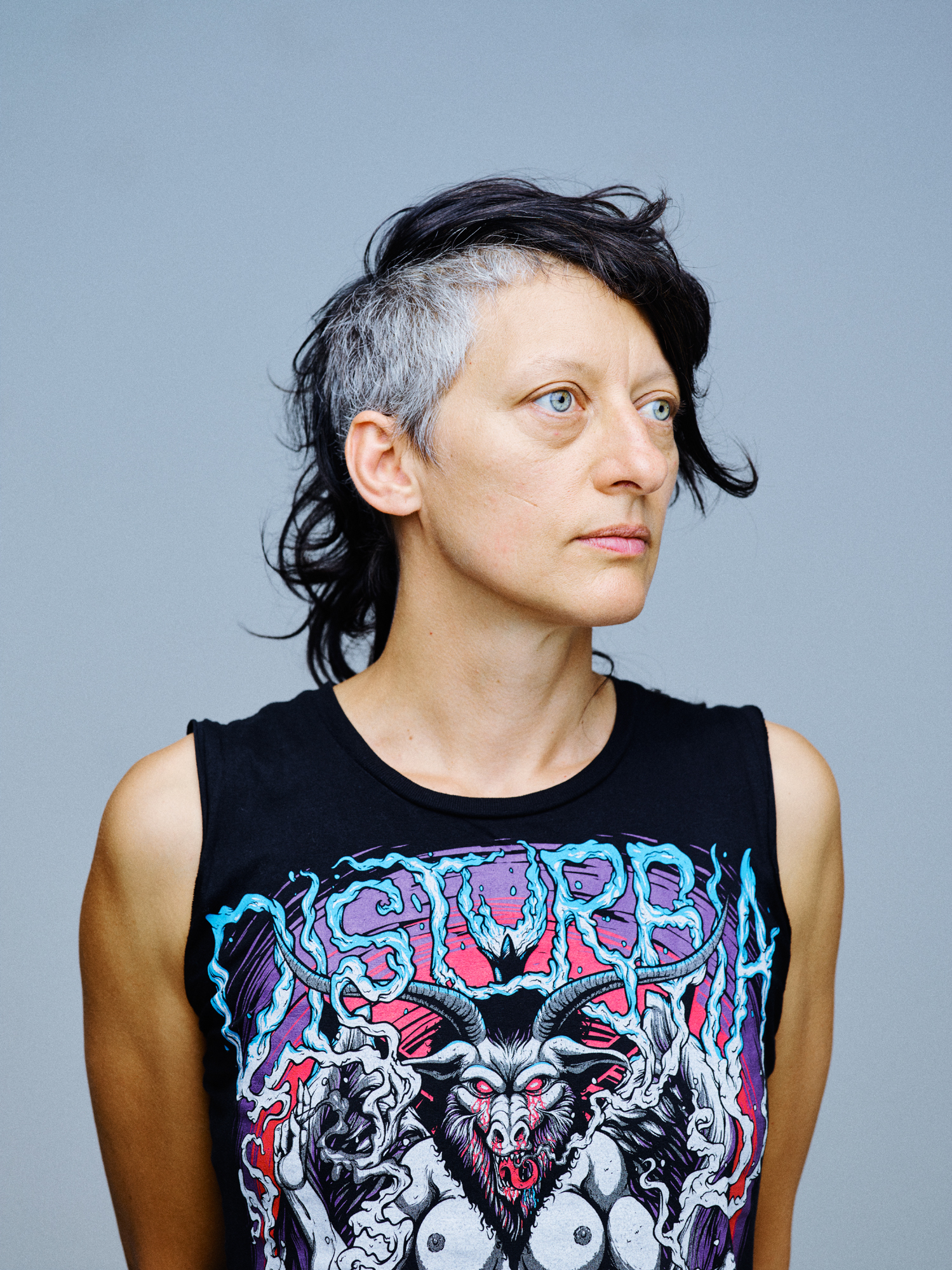 Angela Marzullo, Genève 2016 portrait réalisé par Sandra Pointet